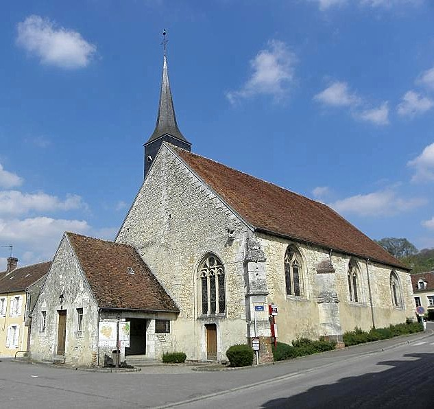 Église de La Chapelle-Montligeon (61).